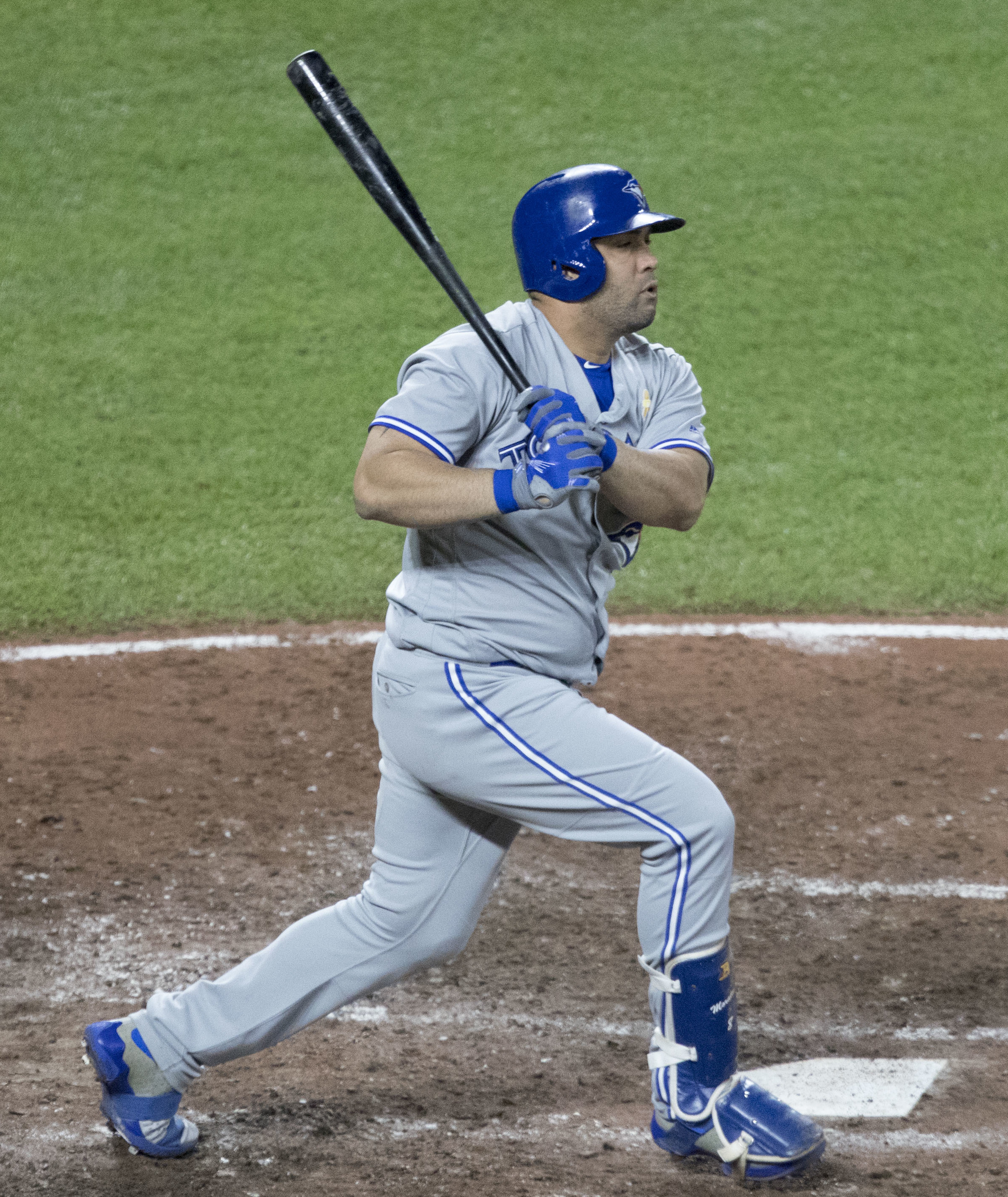 Blue Jays at Orioles 9/1/17